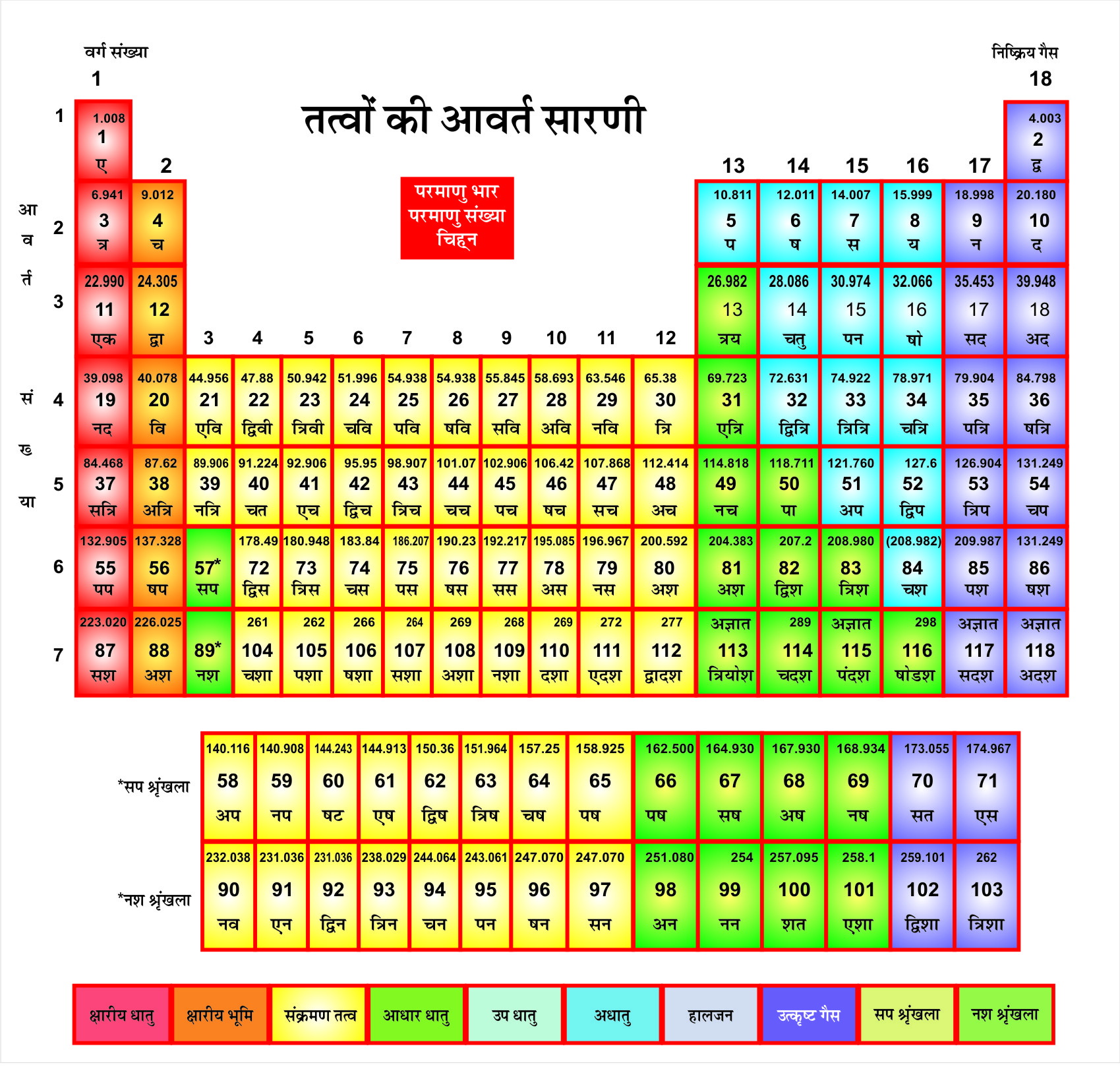 तत्वों की आवर्त सारणी